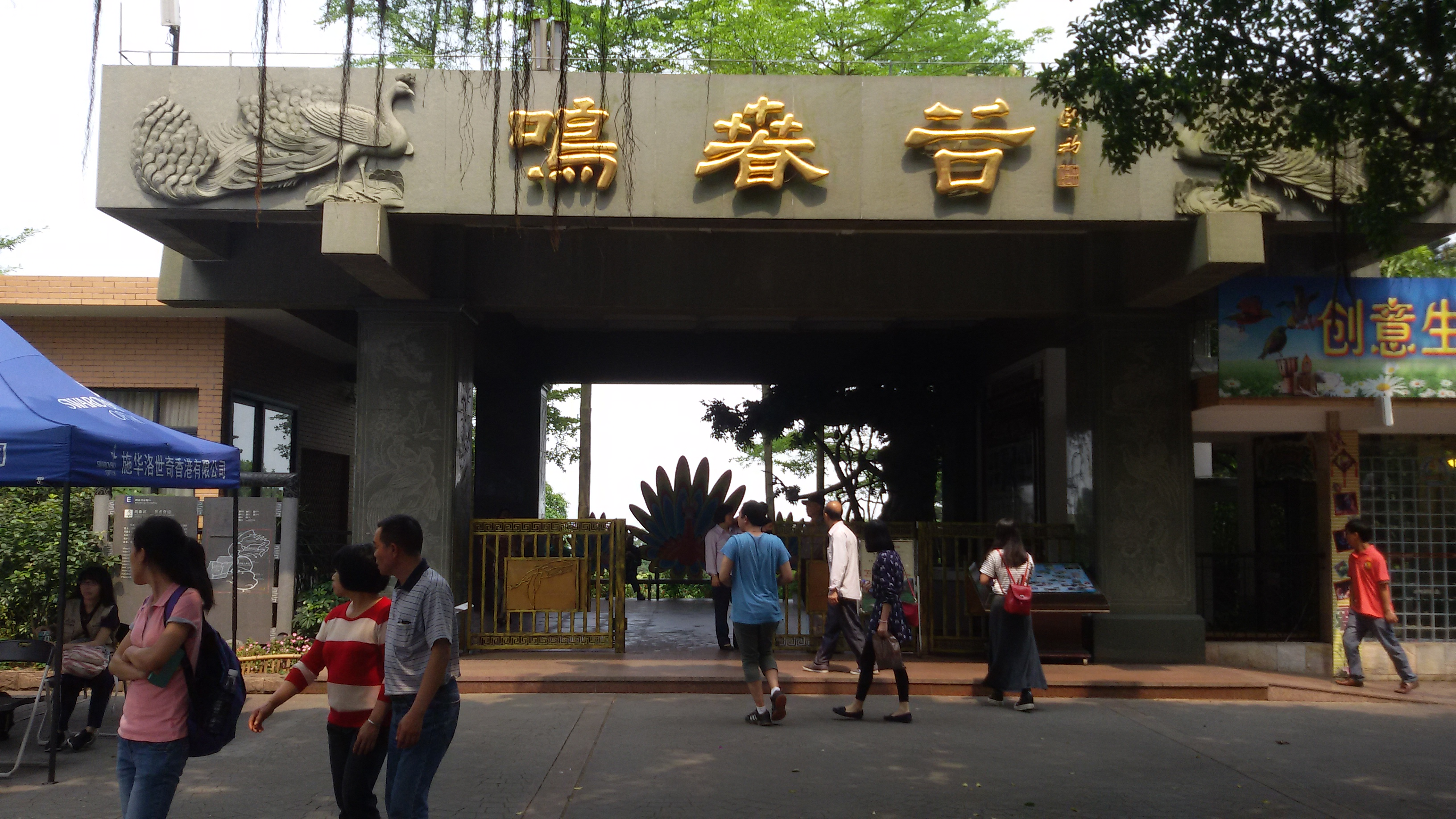 粵語: 白雲山嘅鳴春谷景區